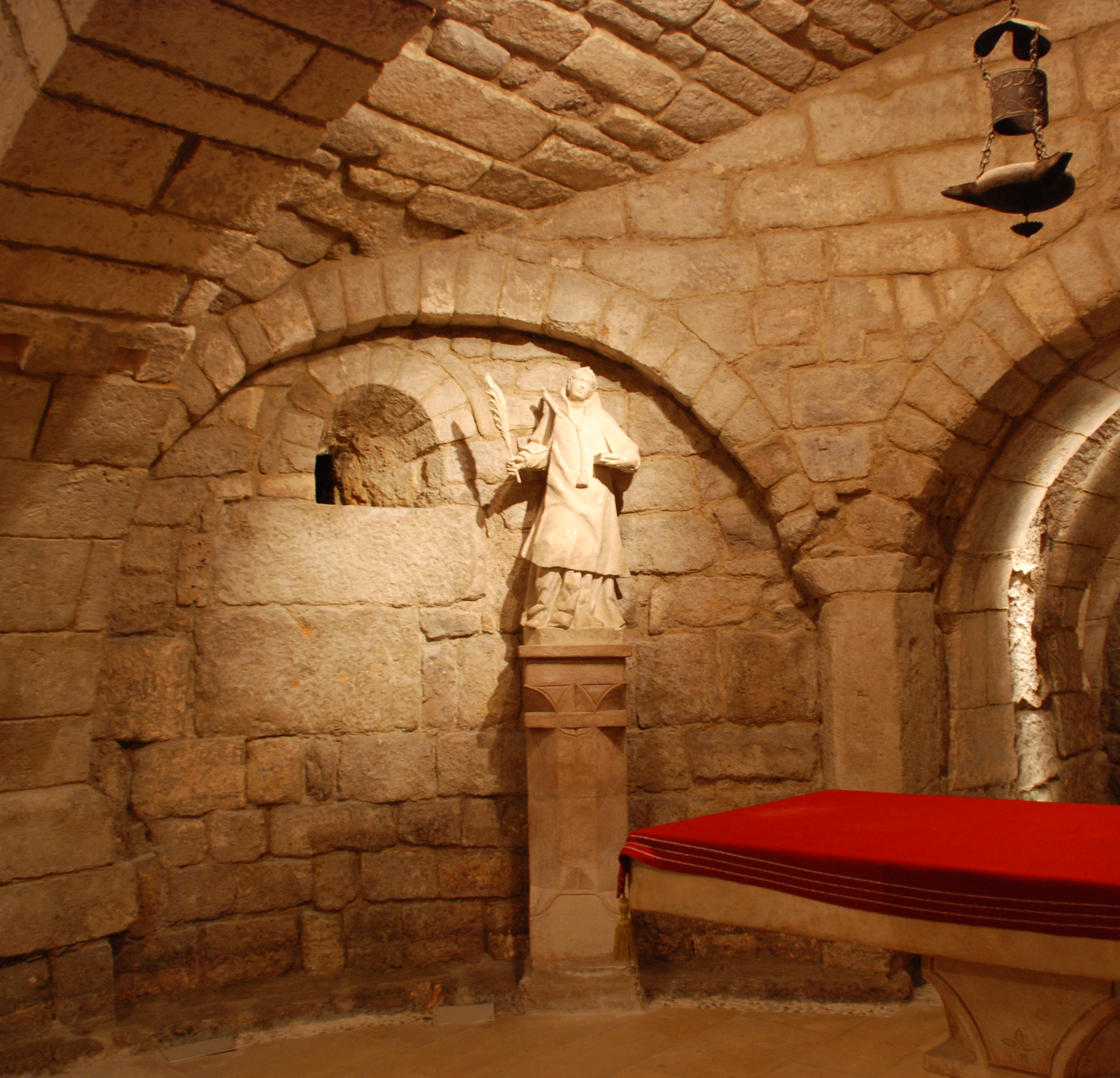 Catedral de Palencia, Cripta, Palencia (España). Capilla de San Antolín, prerrománica s XI.